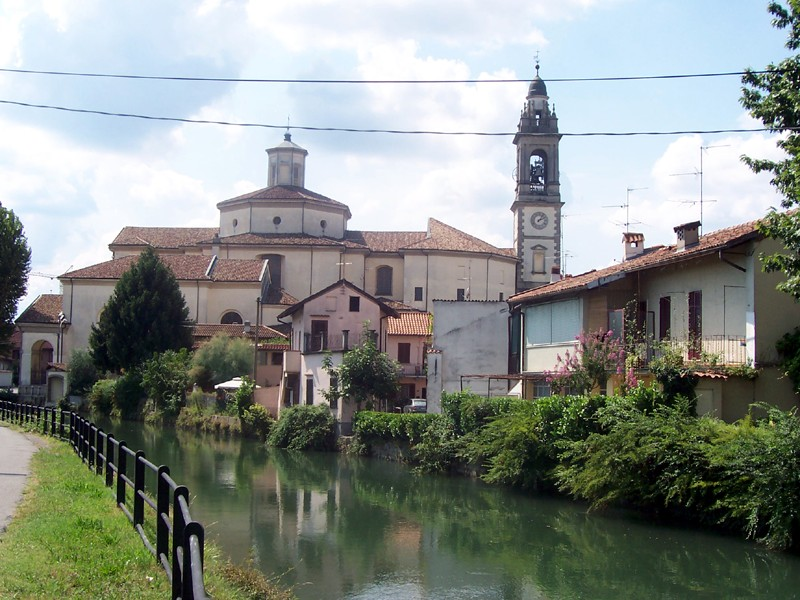 Gorgonzola - Naviglio Martesana e sullo sfondo la Chiesa Parrocchiale dei Ss. Gervasio e Protasio